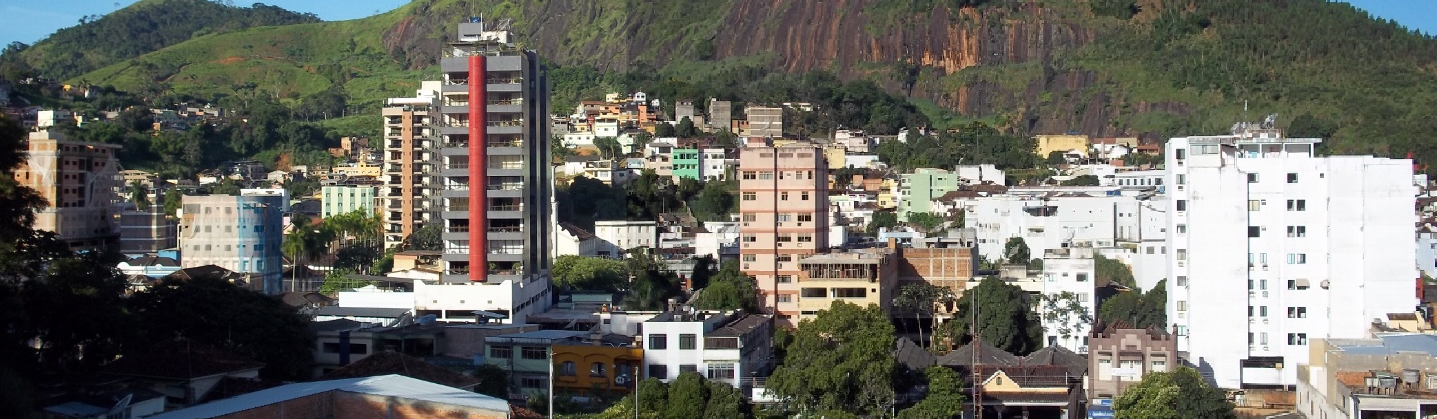 Vista parcial do centro de Carangola.